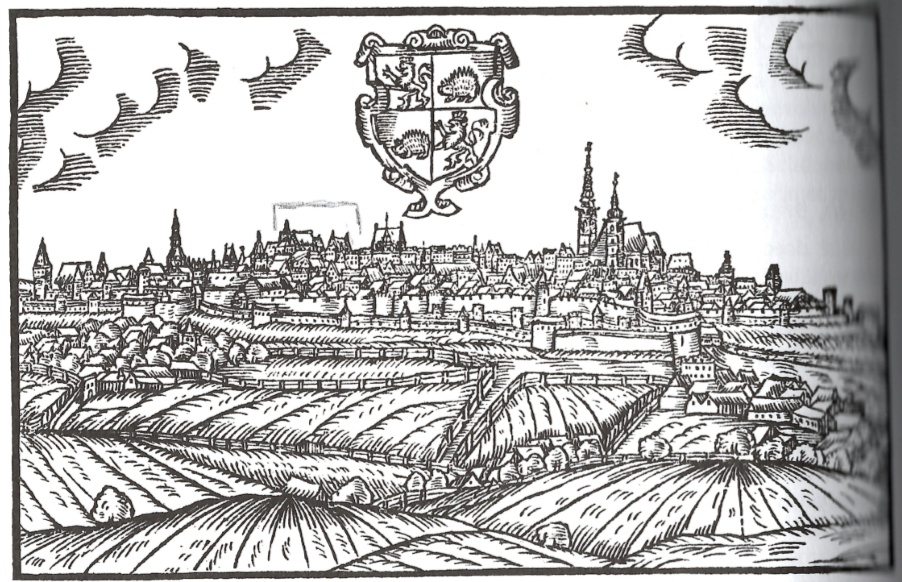 Veduta Jihlavy Jana Willenberga s vyznačeným areálem jihlavského dominikánského kláštera